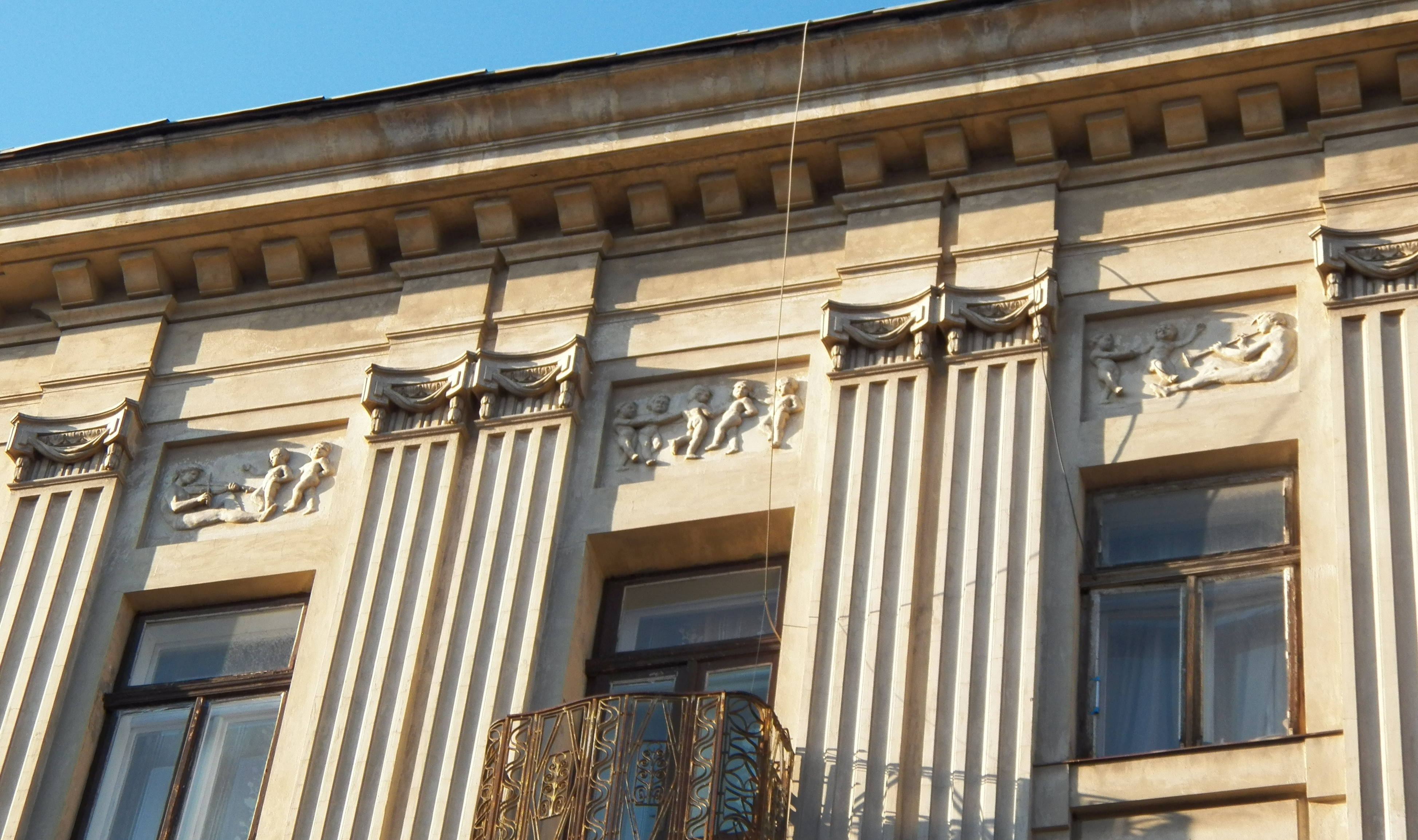 житловий будинок, Львів, Пекарська, 5